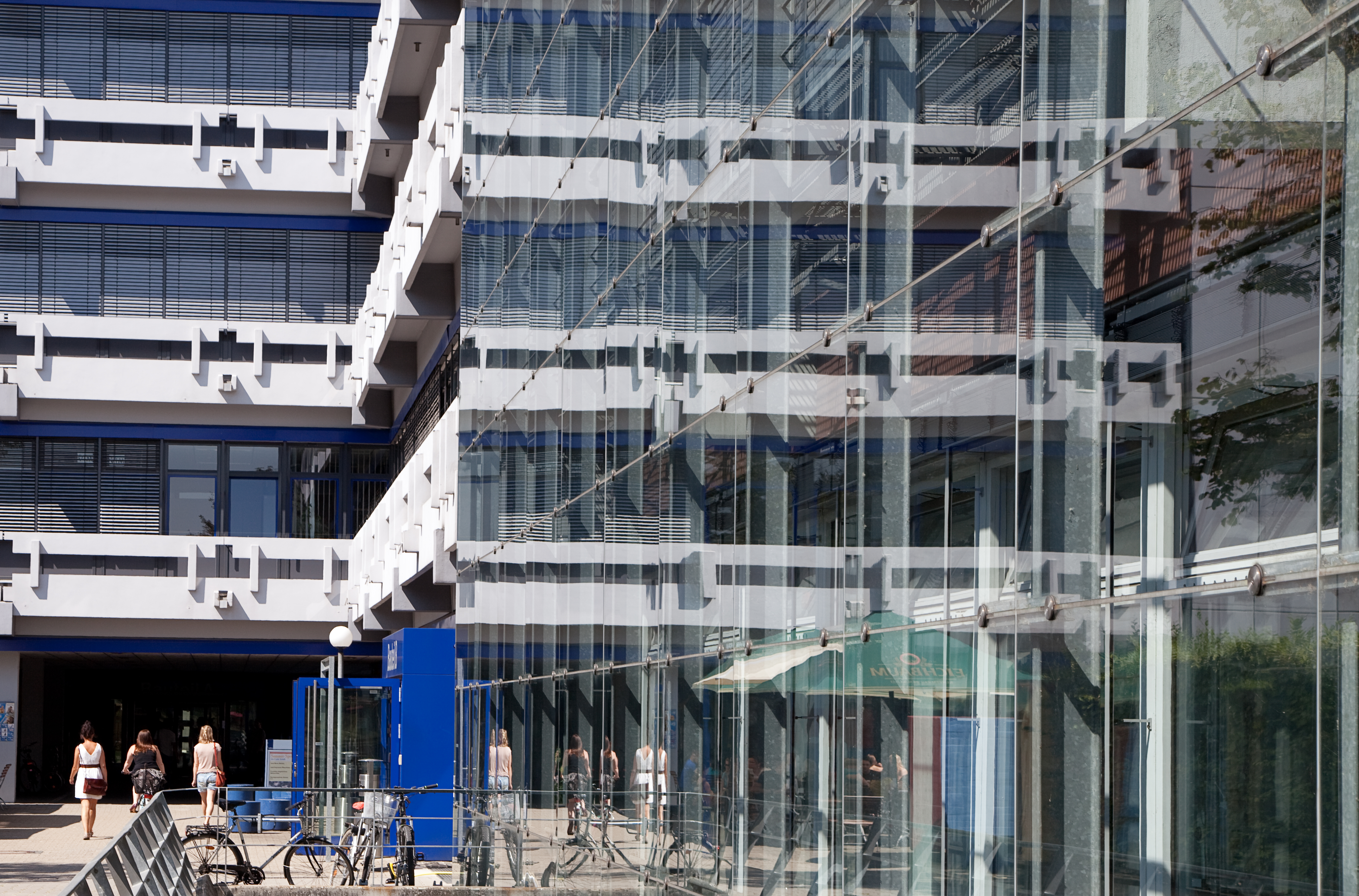 Gebäude A5